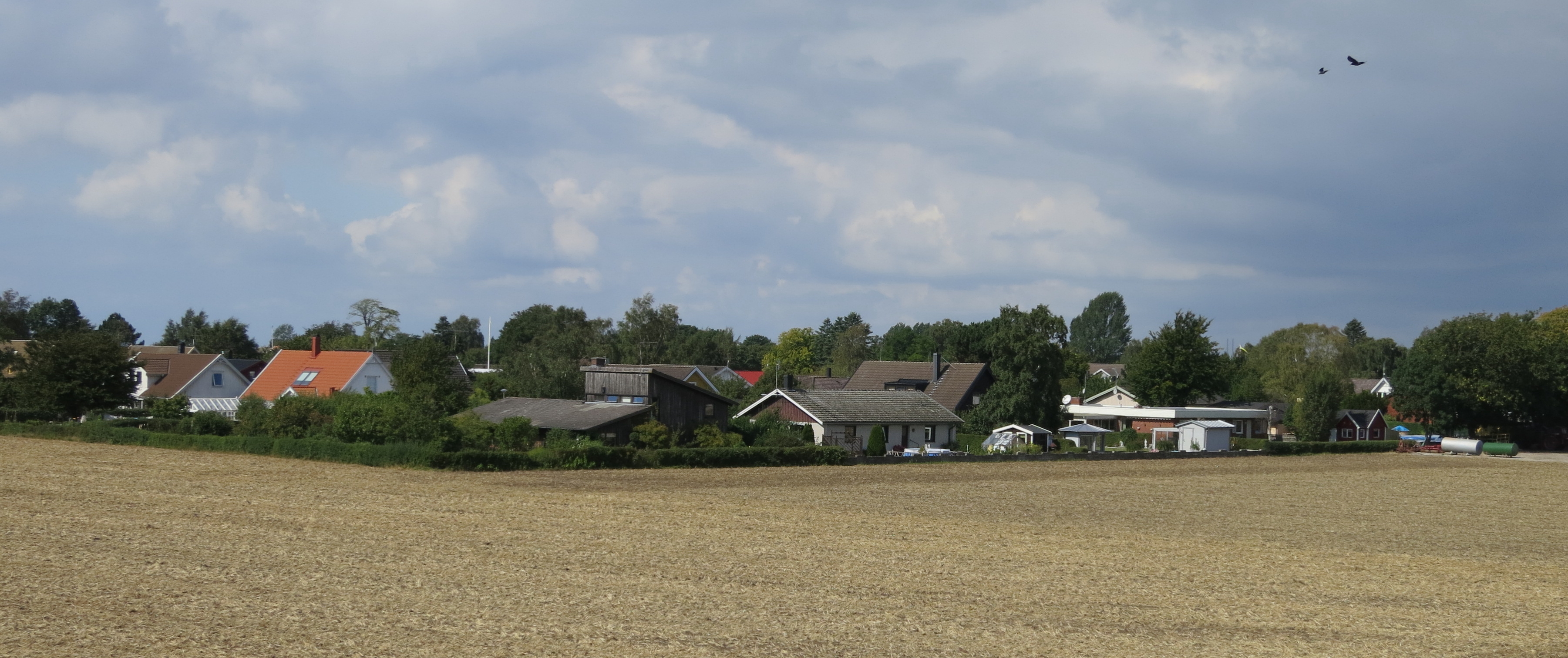 Gessie villastad